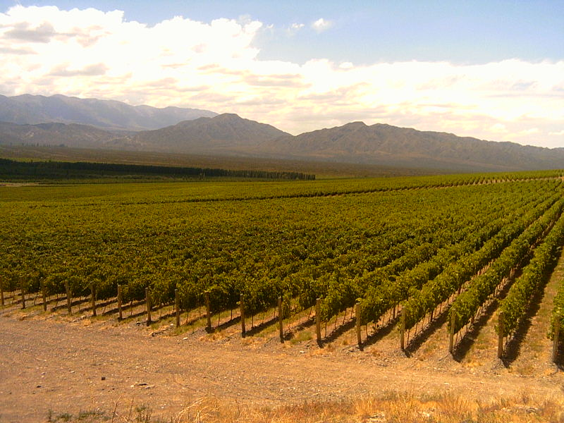 Vista de unas plantaciones de vid en el Valle de Pedernal, provincia de San Juan, Argentina